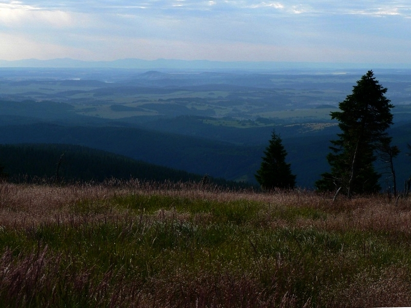 Pohled na Nízký Jeseník z Jeleního hřbetu, v pozadí hřeben Beskyd, před ním Velký Roudný.